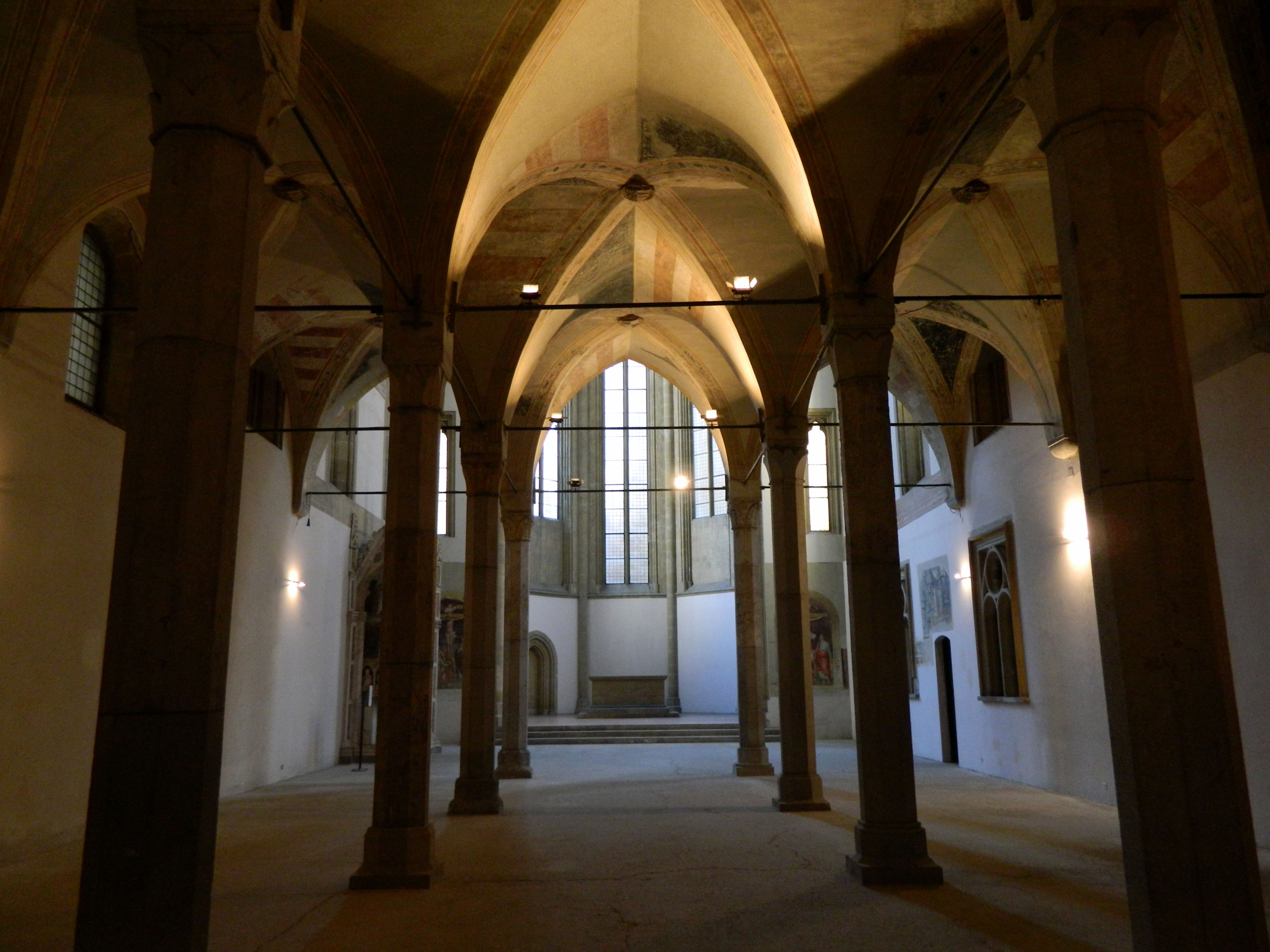 Chiesa di Santa Maria Donnaregina Vecchia (Napoli) - Navata